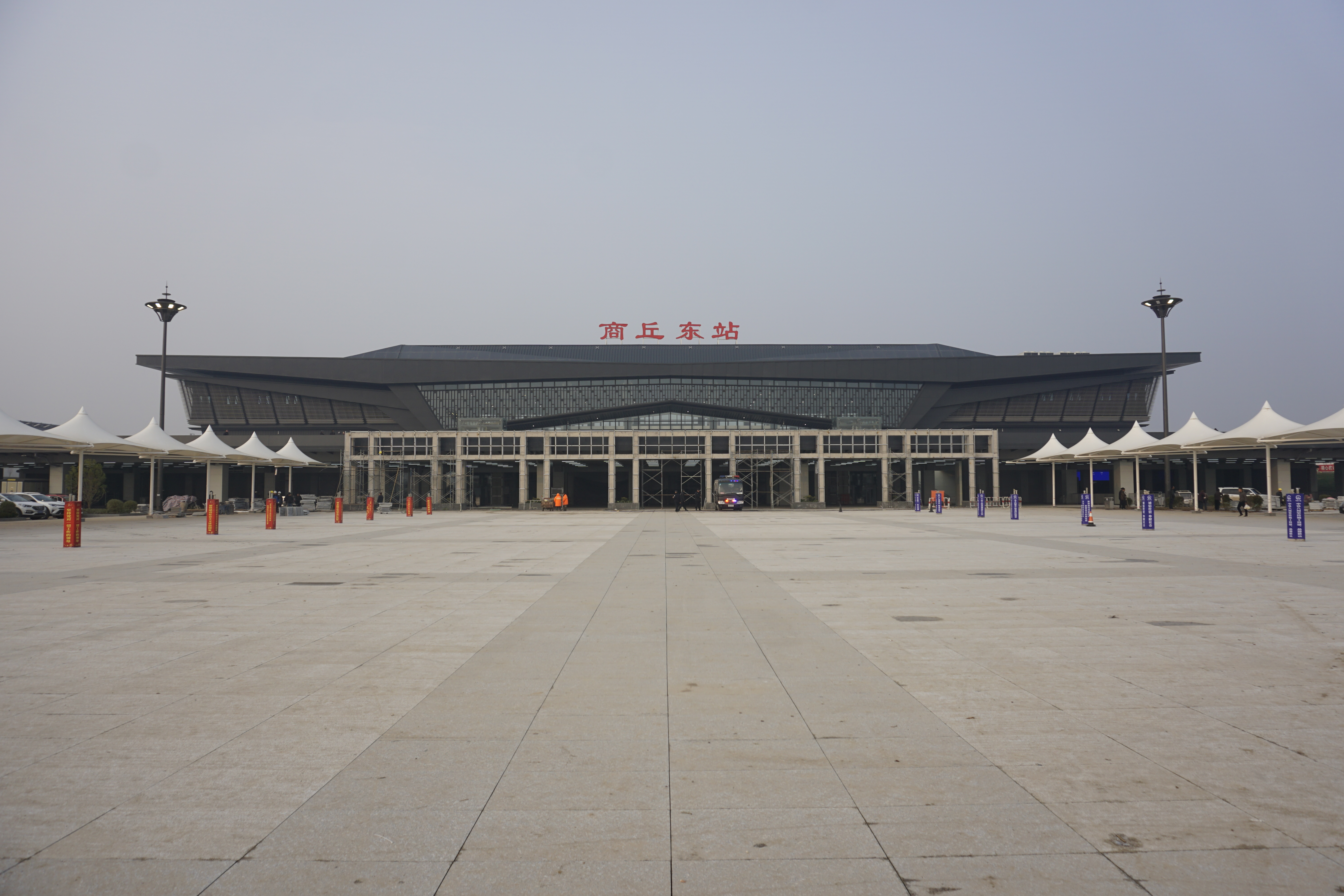 商丘东站正面